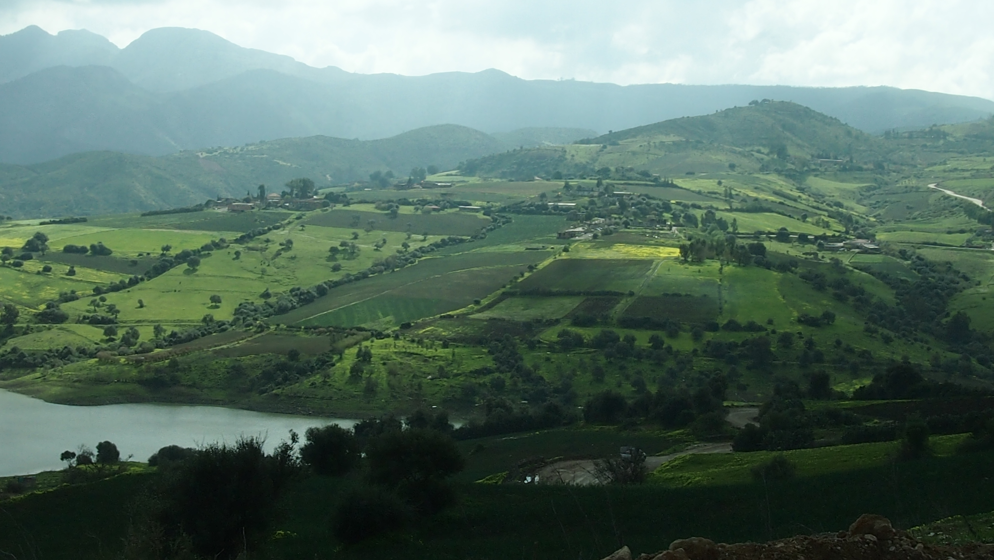 Des champs agricoles dans la région de Bouira